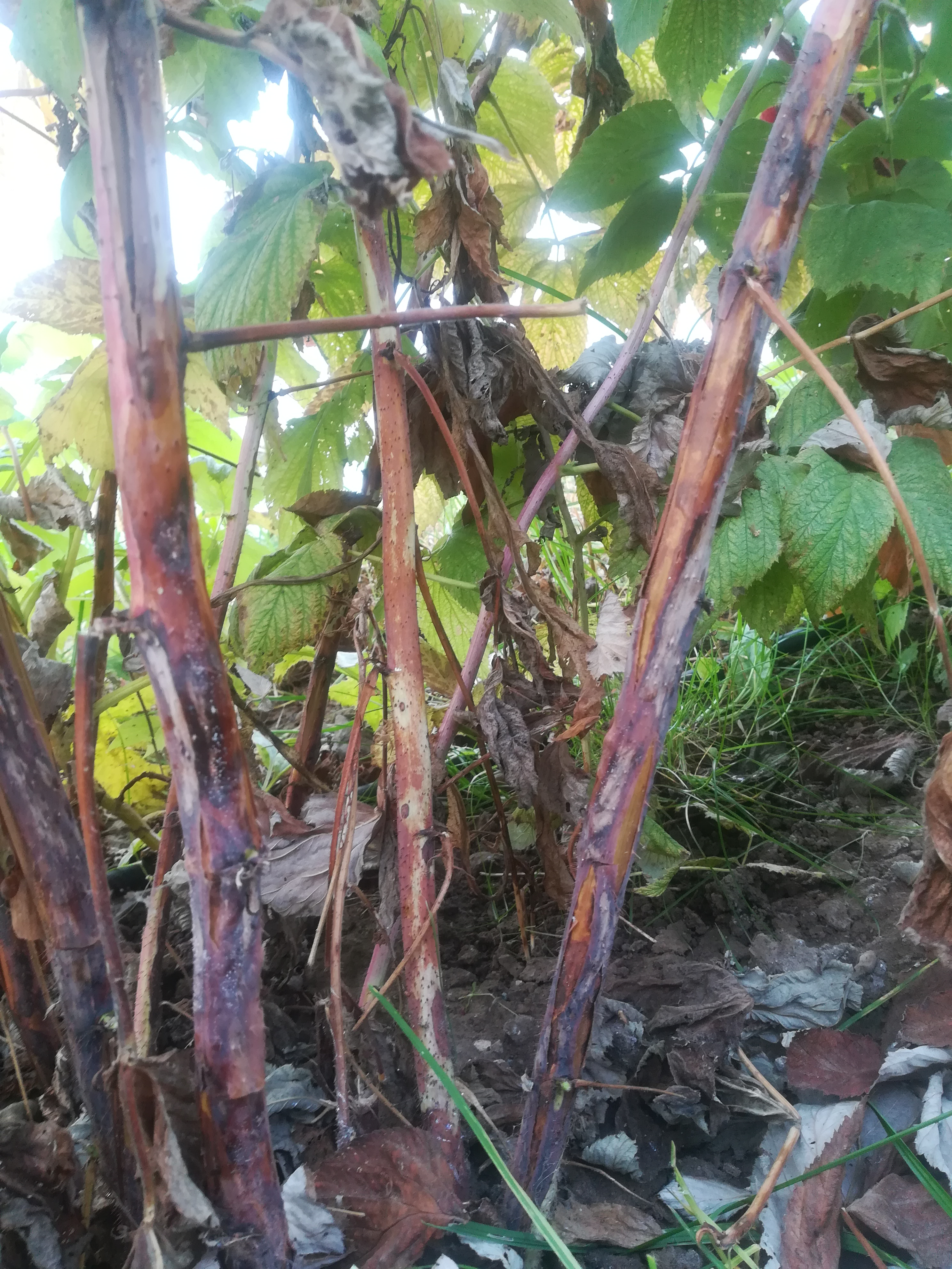 Didymella applanata uz rudens aveņu dzinumiem